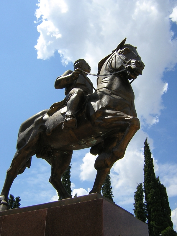 Podgorica